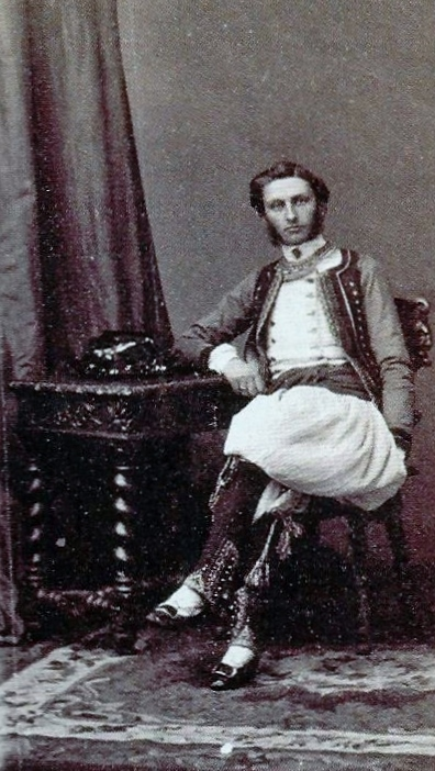 Portrait du vicomte René de Kerret (1833-1898), ancien marin, bienfaiteur de Brasparts.